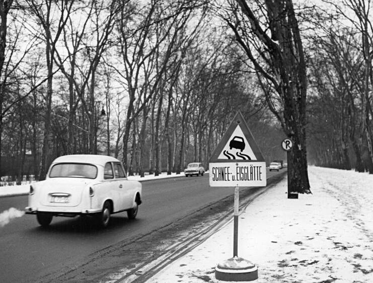 Berlin, Treptow, Pushkin-Allee, Winter Zentralbild Brüggmann 12.12.1963 Winter in Berlin Der erste Schneefall bringt den Kraftfahrern vermehrte Schwierigkeiten. An besonders gefährlichen Stellen, wie hier in der Puschkin-Allee in Berlin-Treptow, wurden bereits Warnschilder aufgestellt. (unser Bild) .